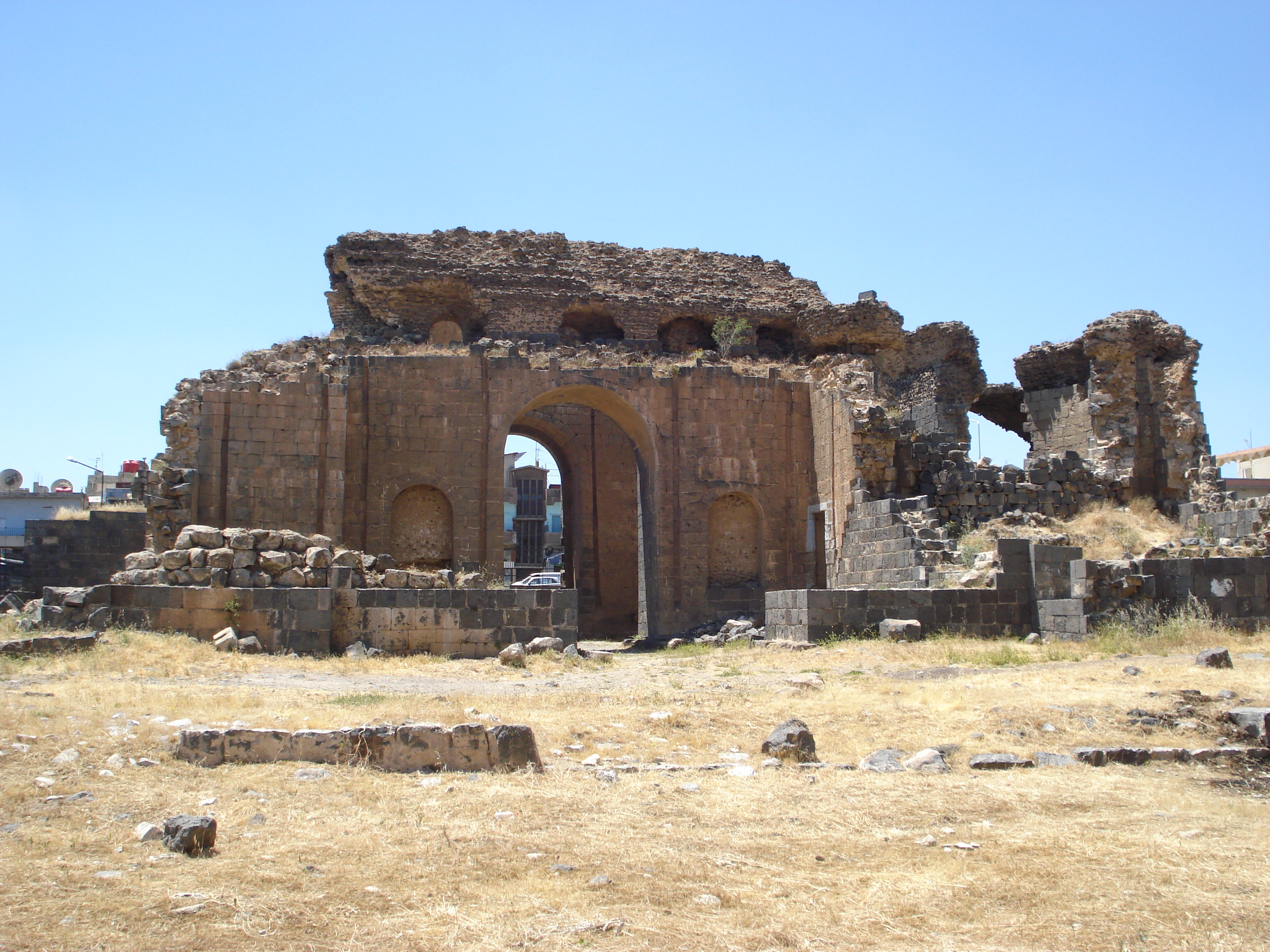 حمامات رومانية